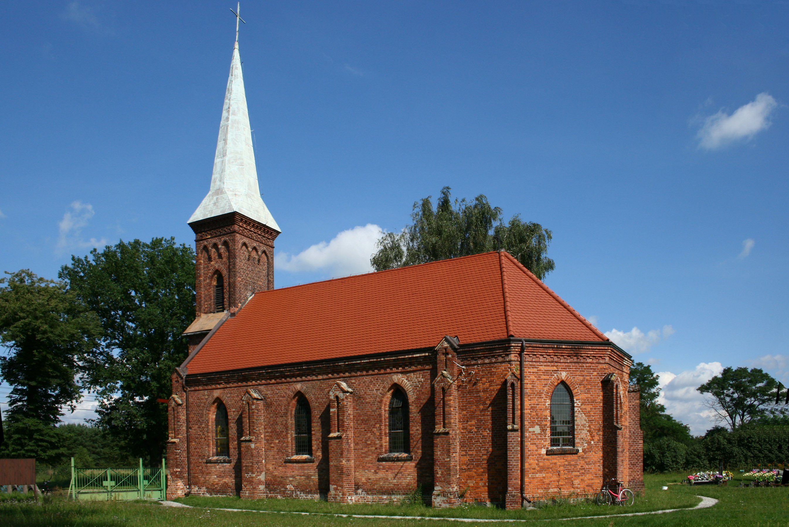 Kościół św. Piotra i Pawła w Borzysławcu (woj. zachodniopomorskie)